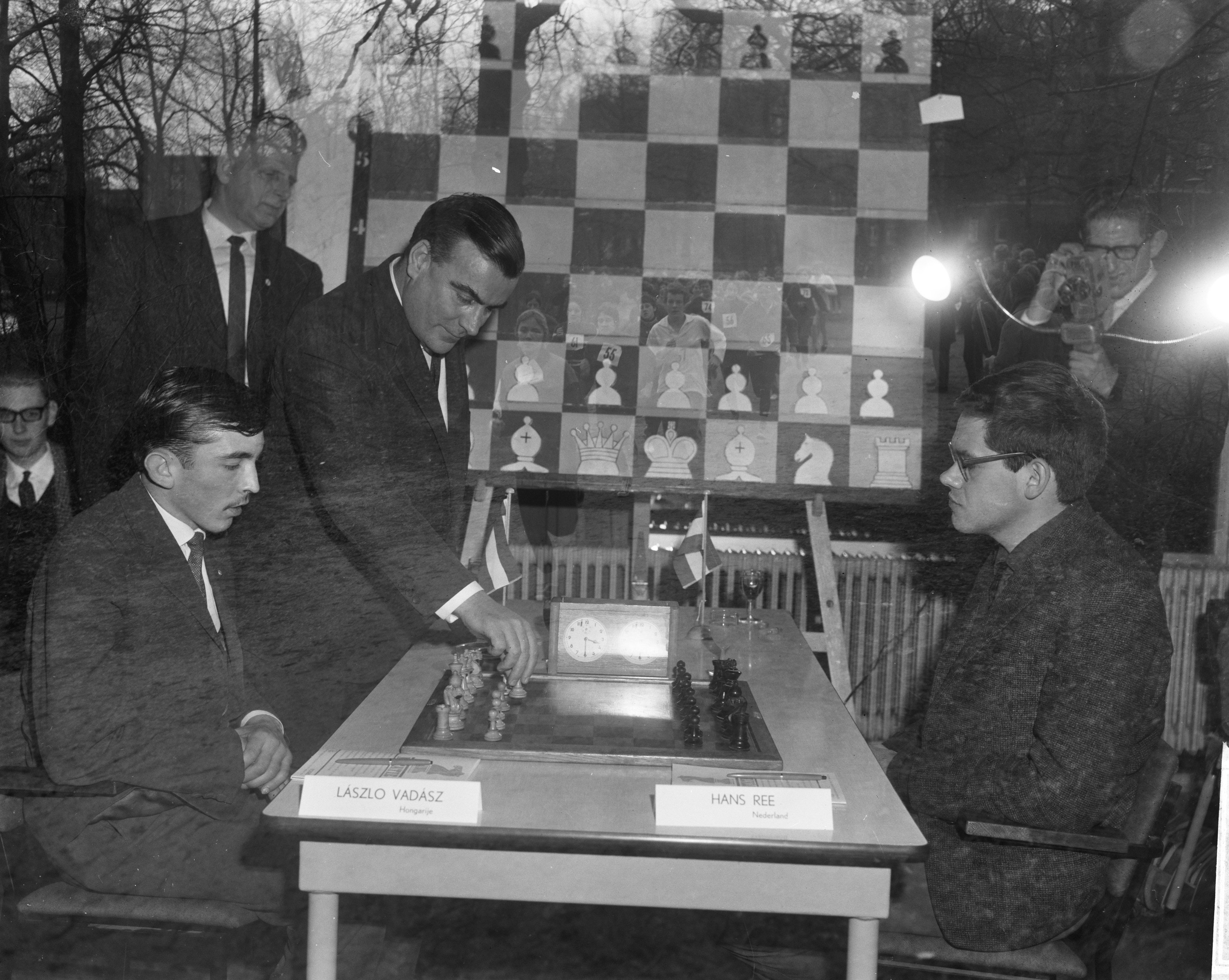 Collectie / Archief : Fotocollectie Anefo Reportage / Serie : [ onbekend ] Beschrijving : Internationaal Jeugd Schaaktoernooi te Groningen, Laszlo Vadars (Hongarije) en Hans Ree (Nederland, rechts) Datum : 27 december 1965 Locatie : Groningen Trefwoorden : schaken, sport Persoonsnaam : Ree, Hans, Vadars, Laszlo Fotograaf : Bilsen, Joop van / Anefo Auteursrechthebbende : Nationaal Archief Materiaalsoort : Negatief (zwart/wit) Nummer archiefinventaris : bekijk toegang 2.24.01.04 Bestanddeelnummer : 918-6102